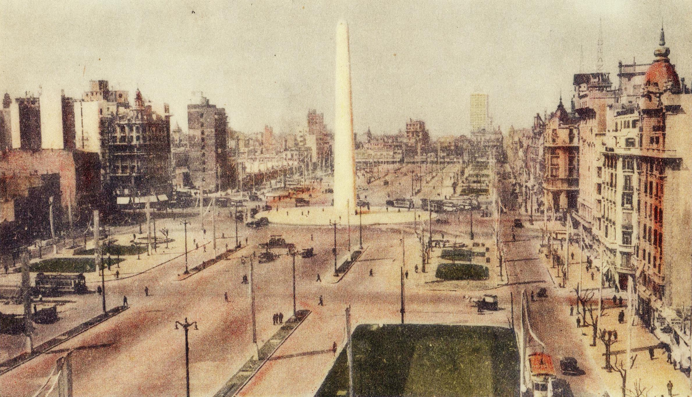 Vista de la Avenida 9 de Julio, Buenos Aires, en la década de 1930. Se ve el Obelisco, inaugurado en 1936.